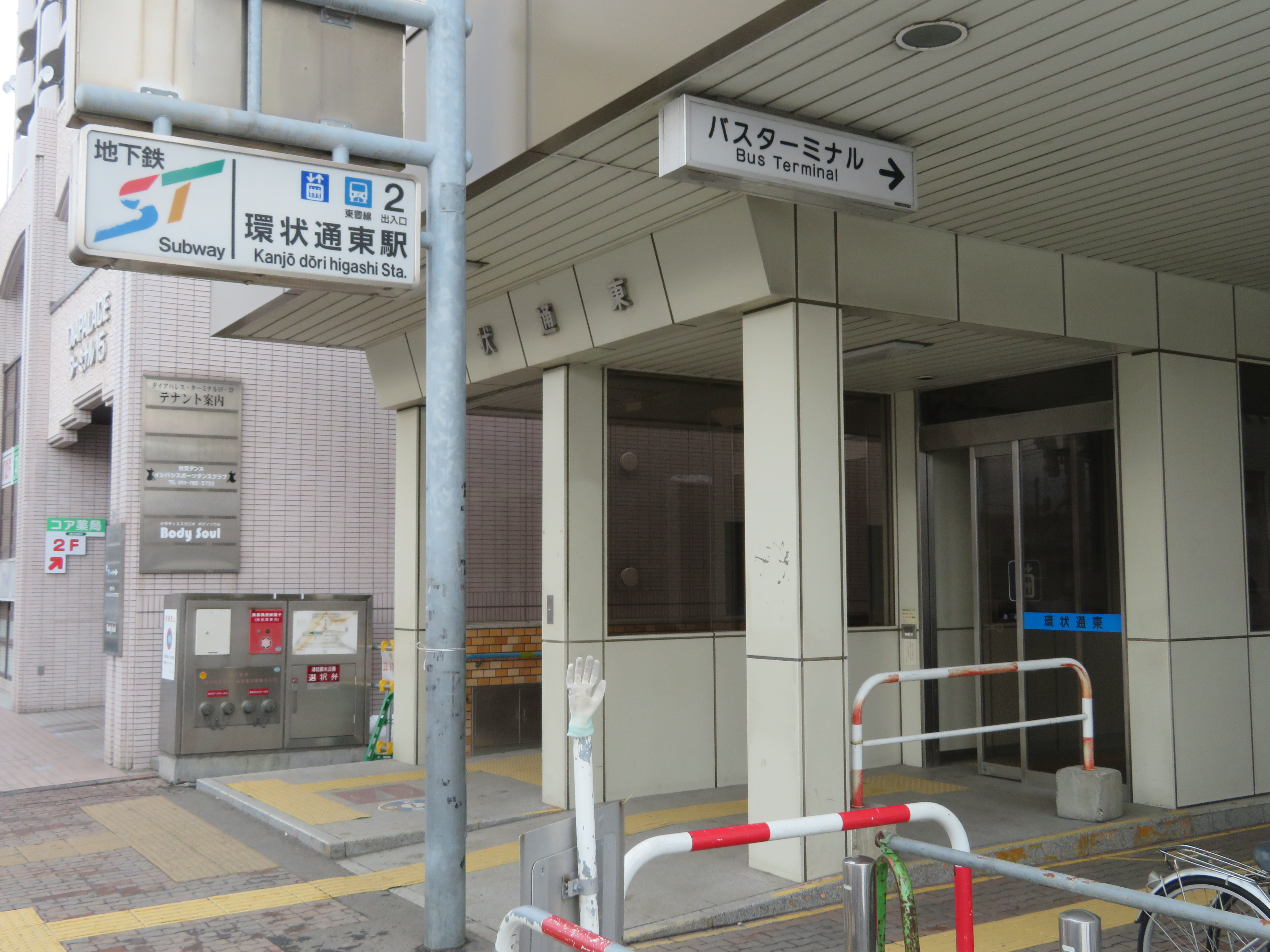 環状通東駅2番出入口 Canon PowerShot SX720 HS